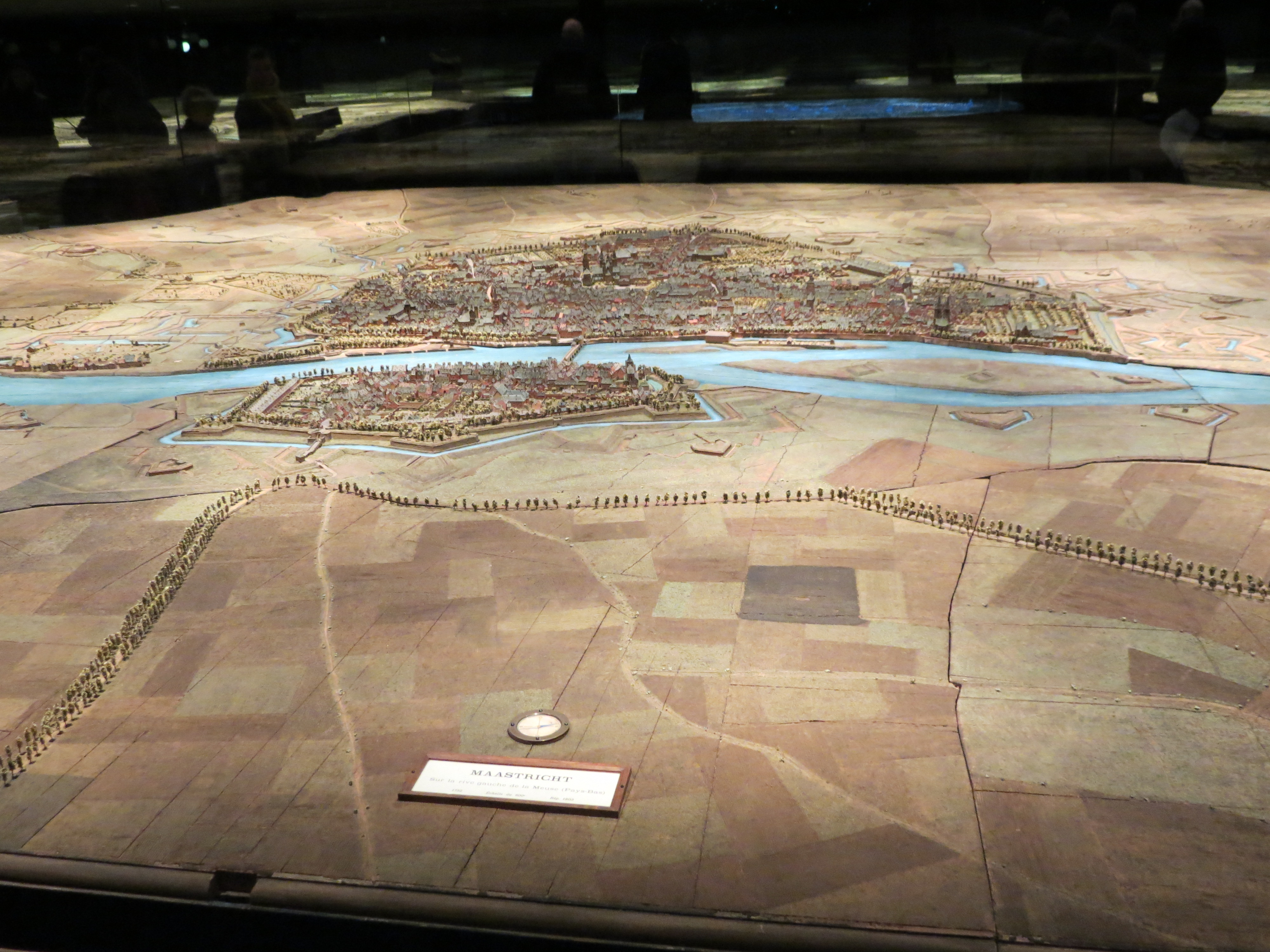 Plan Relief 02 Maastricht 4 PBA Lille 2019